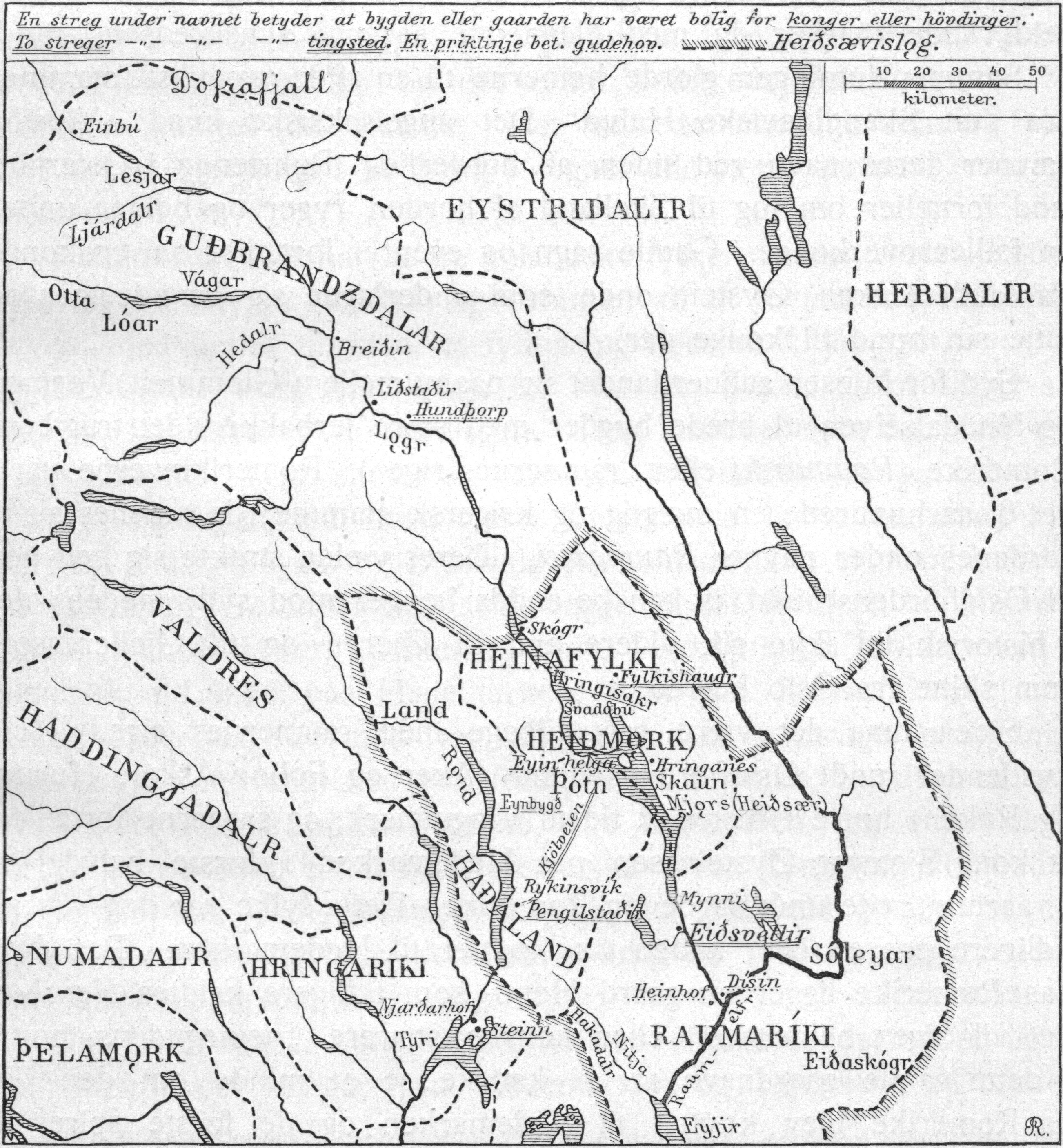 Kart over Opplandene i middelalderen.